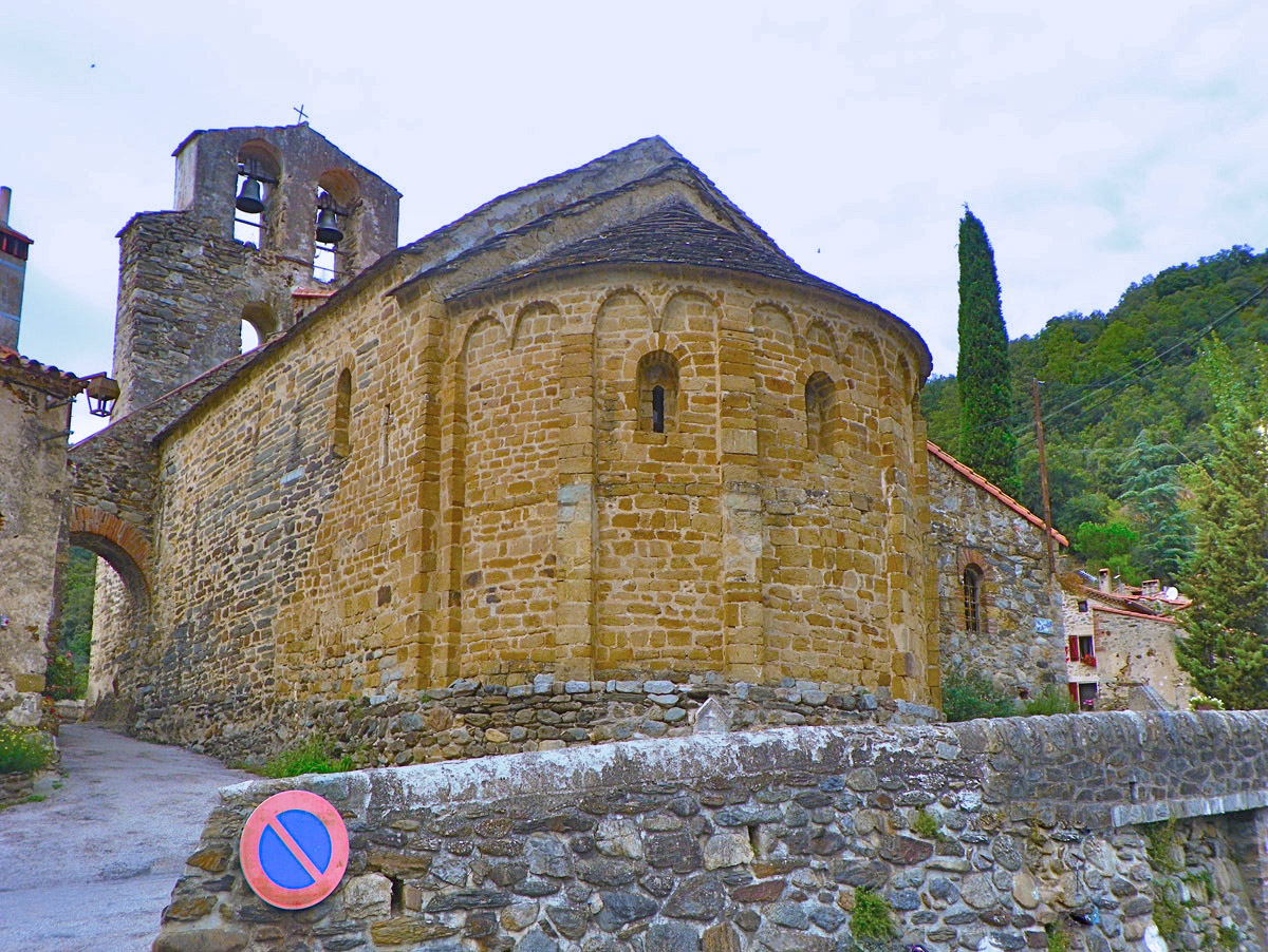 Absis de Sant Sadurní de Bula d'Amunt, al Rosselló